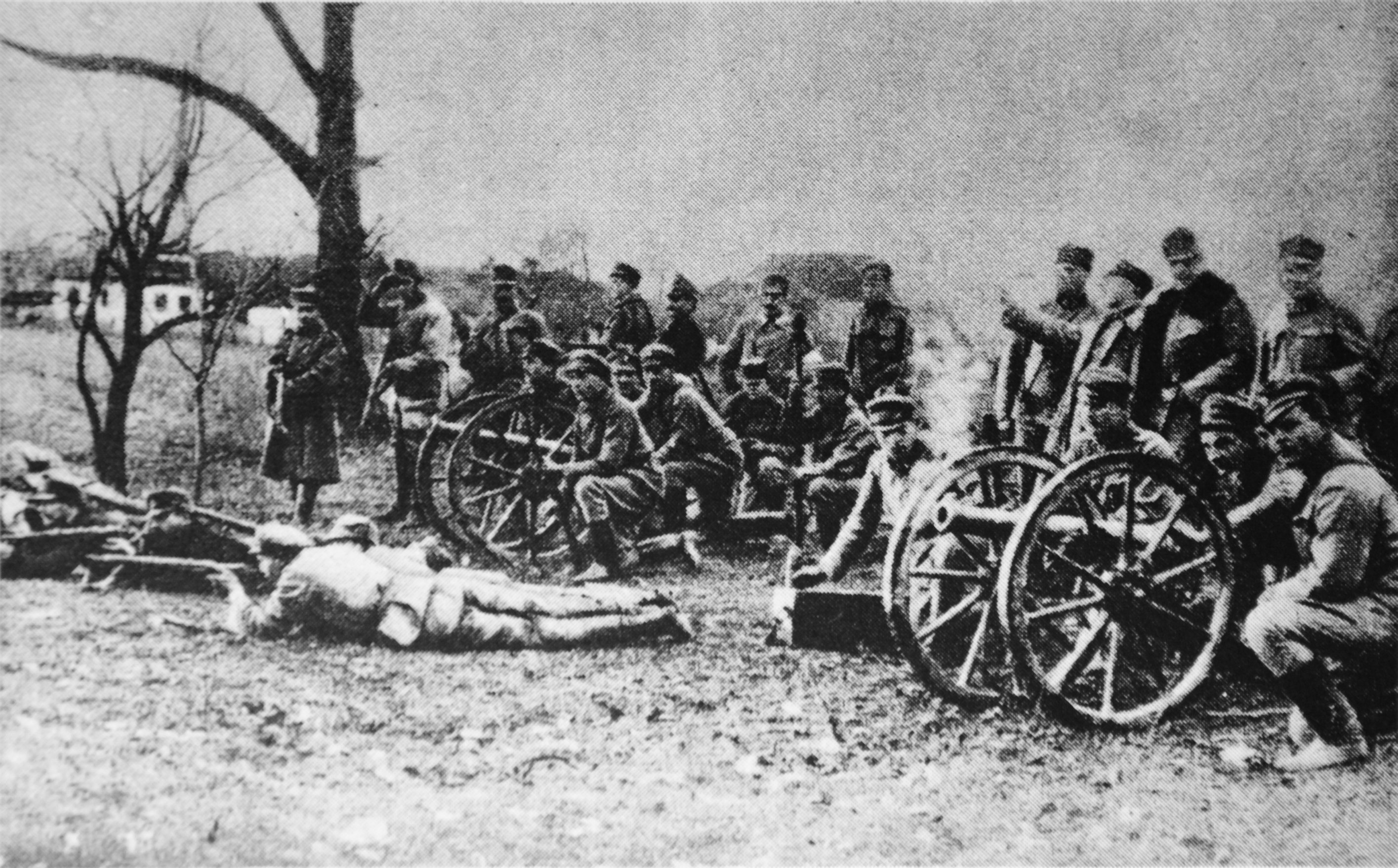 Działa 7 cm M.75 (pieski) przydzielone II Brygadzie Legionów Polskich.